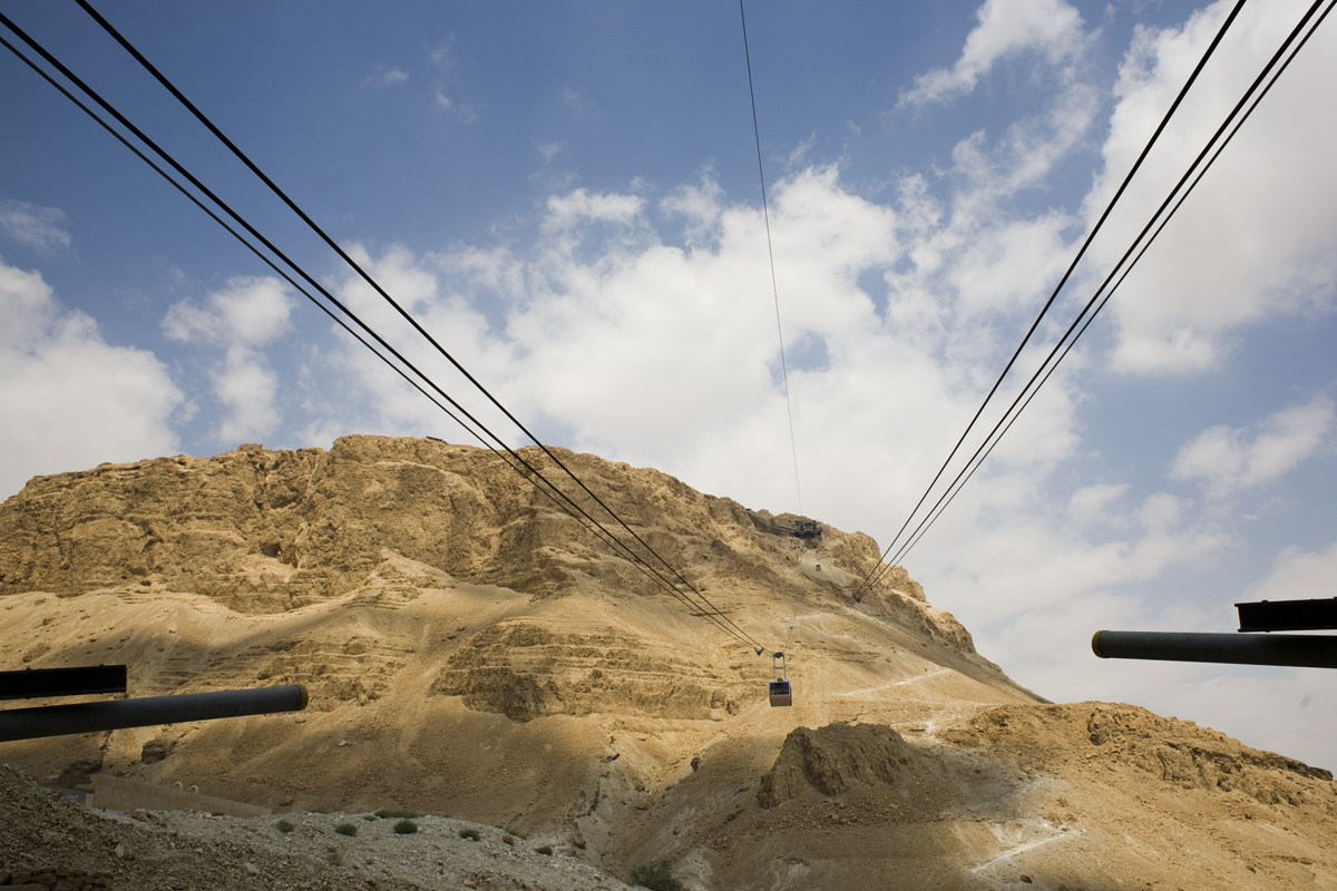 Masada cableway